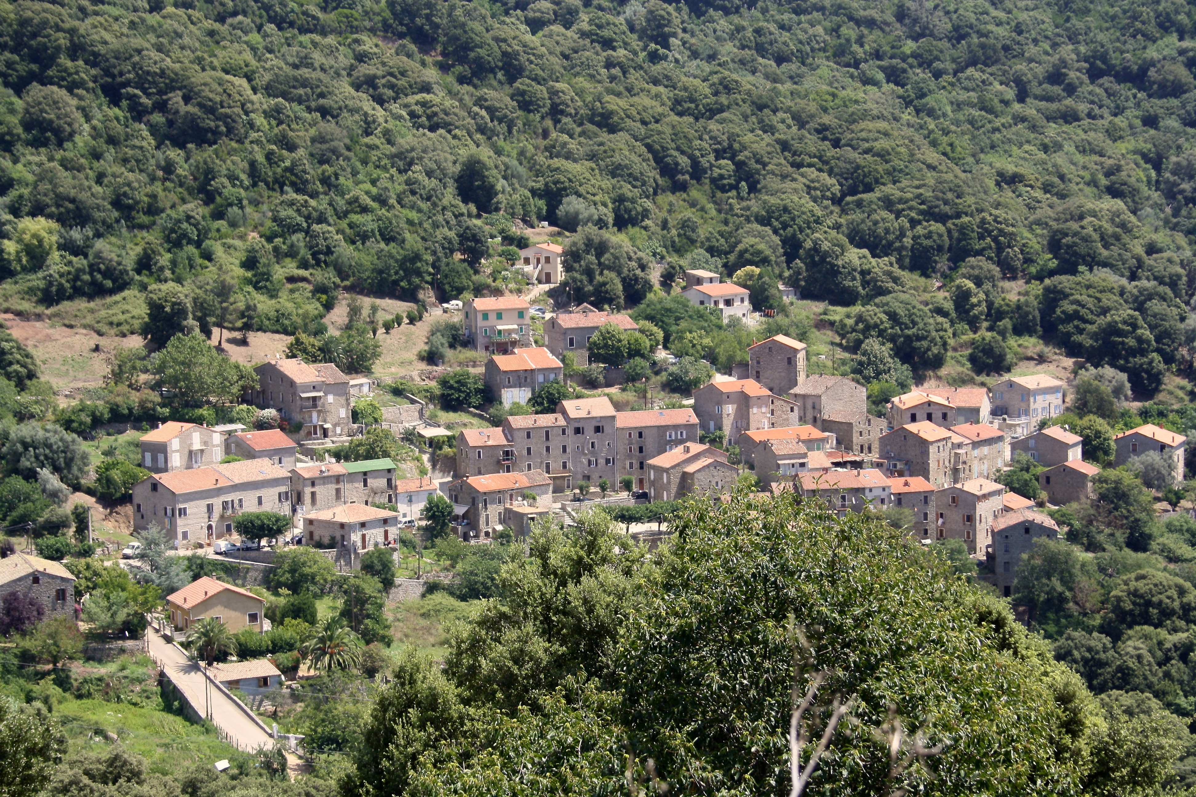 Guargualé Korsika